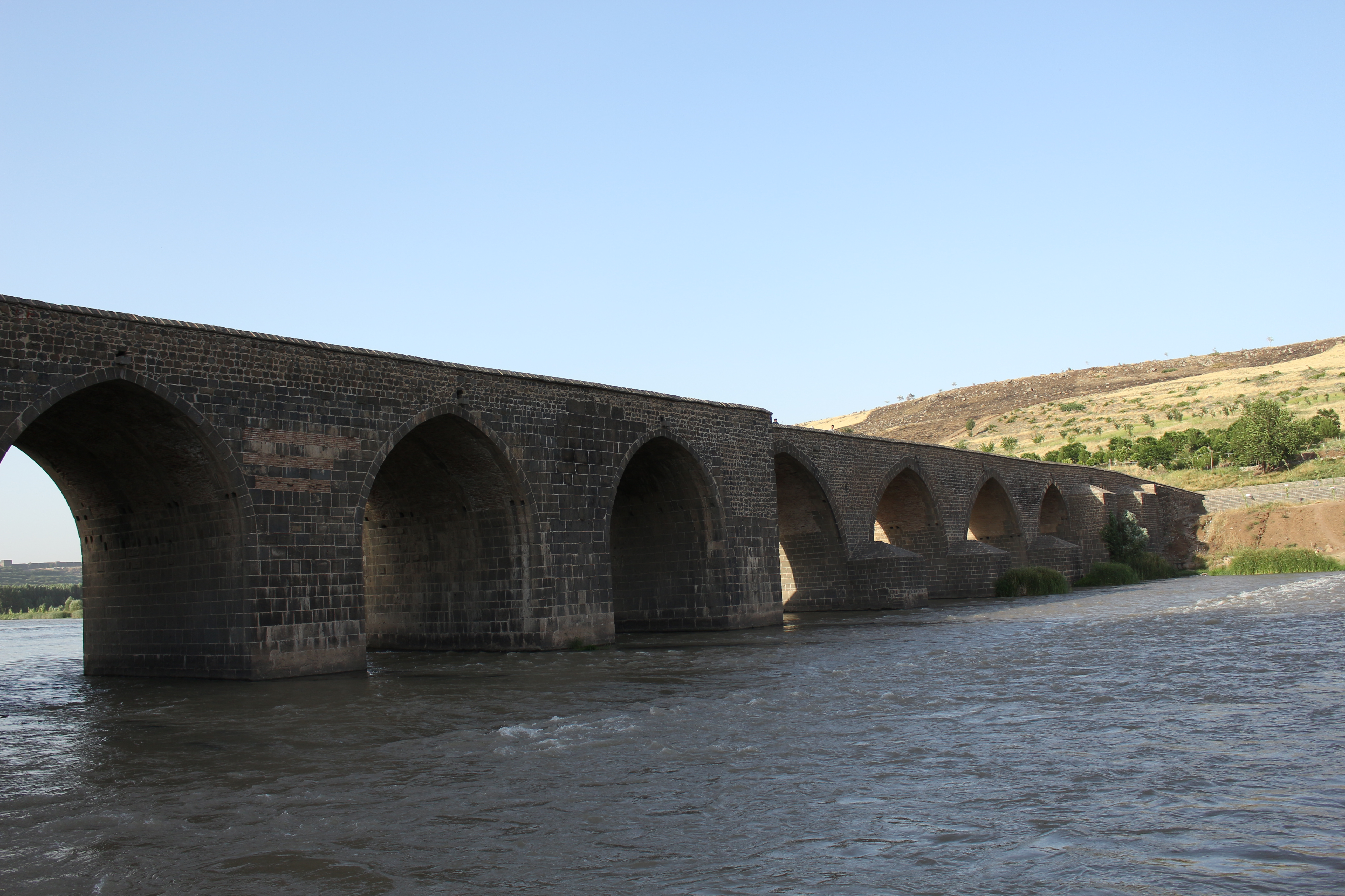 On Gözlü Köprü, 2016